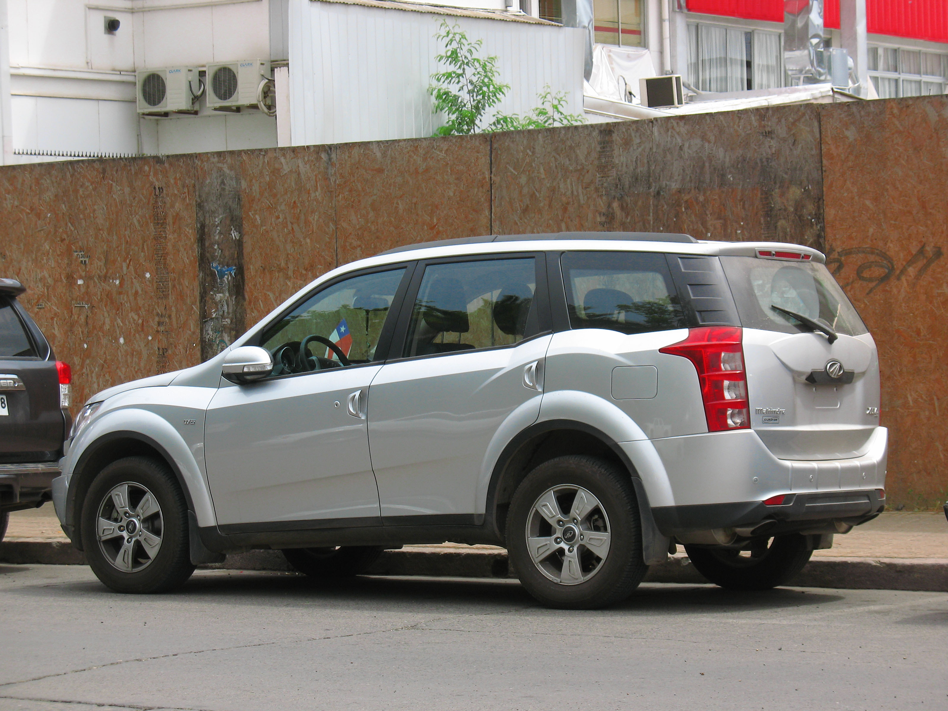 Mahindra XUV 500